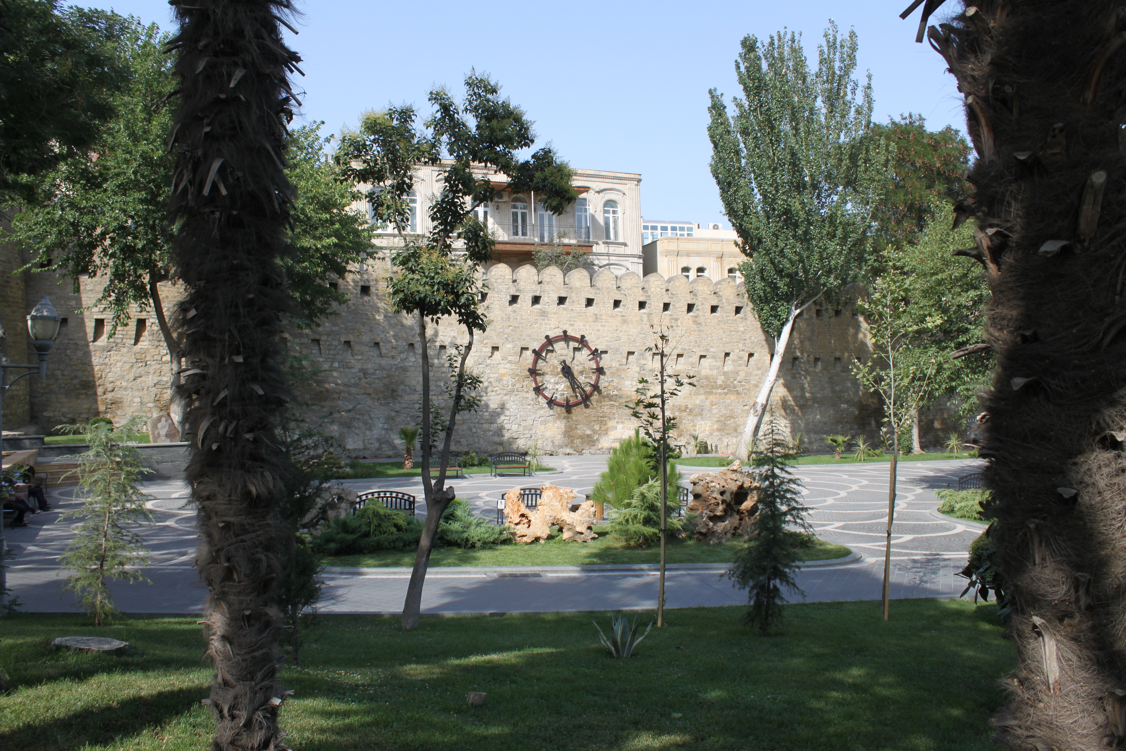 Сад Филармонии в Баку